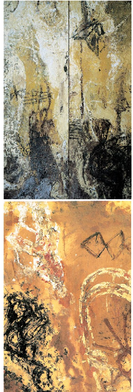 Juan Luis Goenagaren bi olio-pintura. Goian: Amia Kehreri (1991); behean: Izenburu gabekoa.